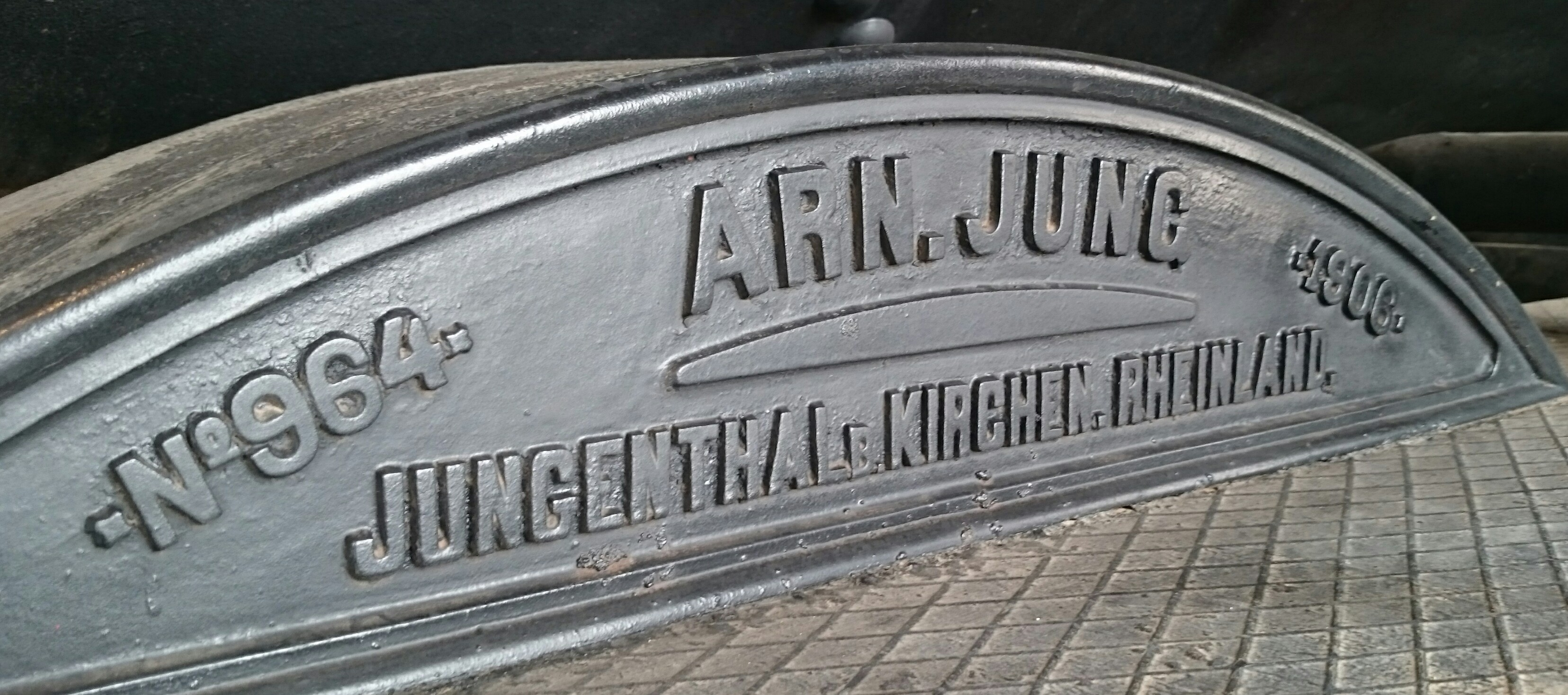 Firmenschild der Dampflokomotive 964 der Fa. Jung im Museum der Hedschasbahn in Mada'in Salih